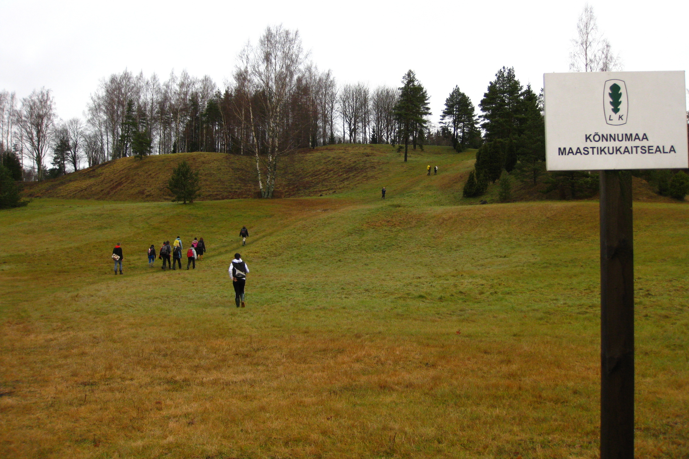 Paluküla Hiiemäe jalamil Kõnnumaa MKA